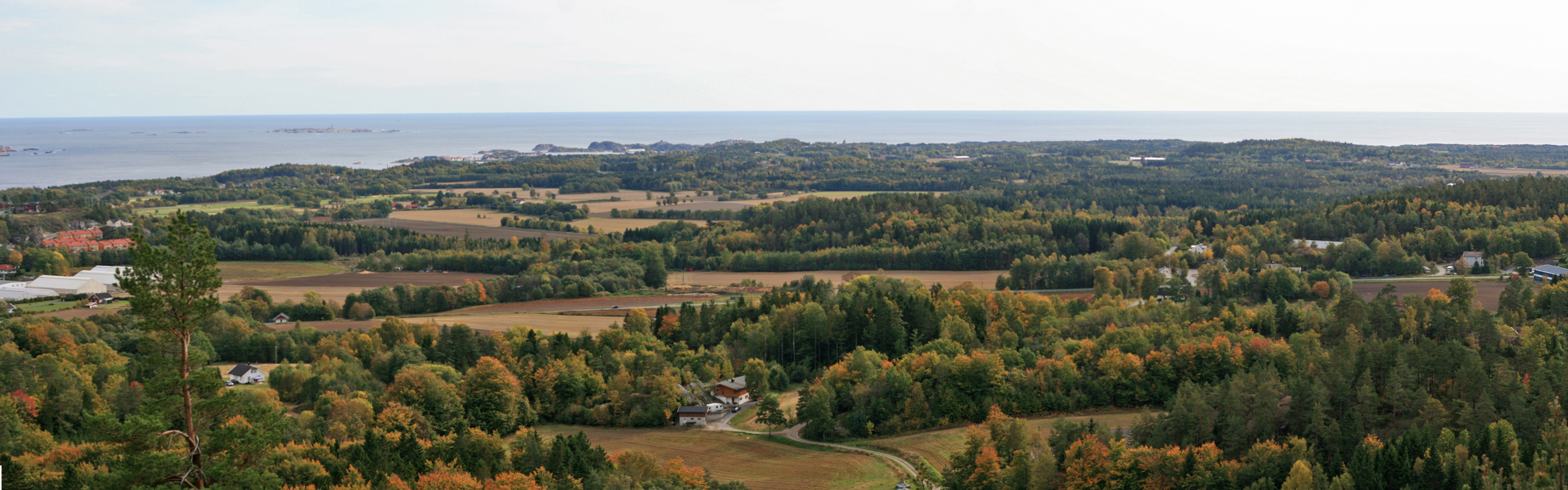 Utsikt over Brunlanes, Larvik, fra Salsås.